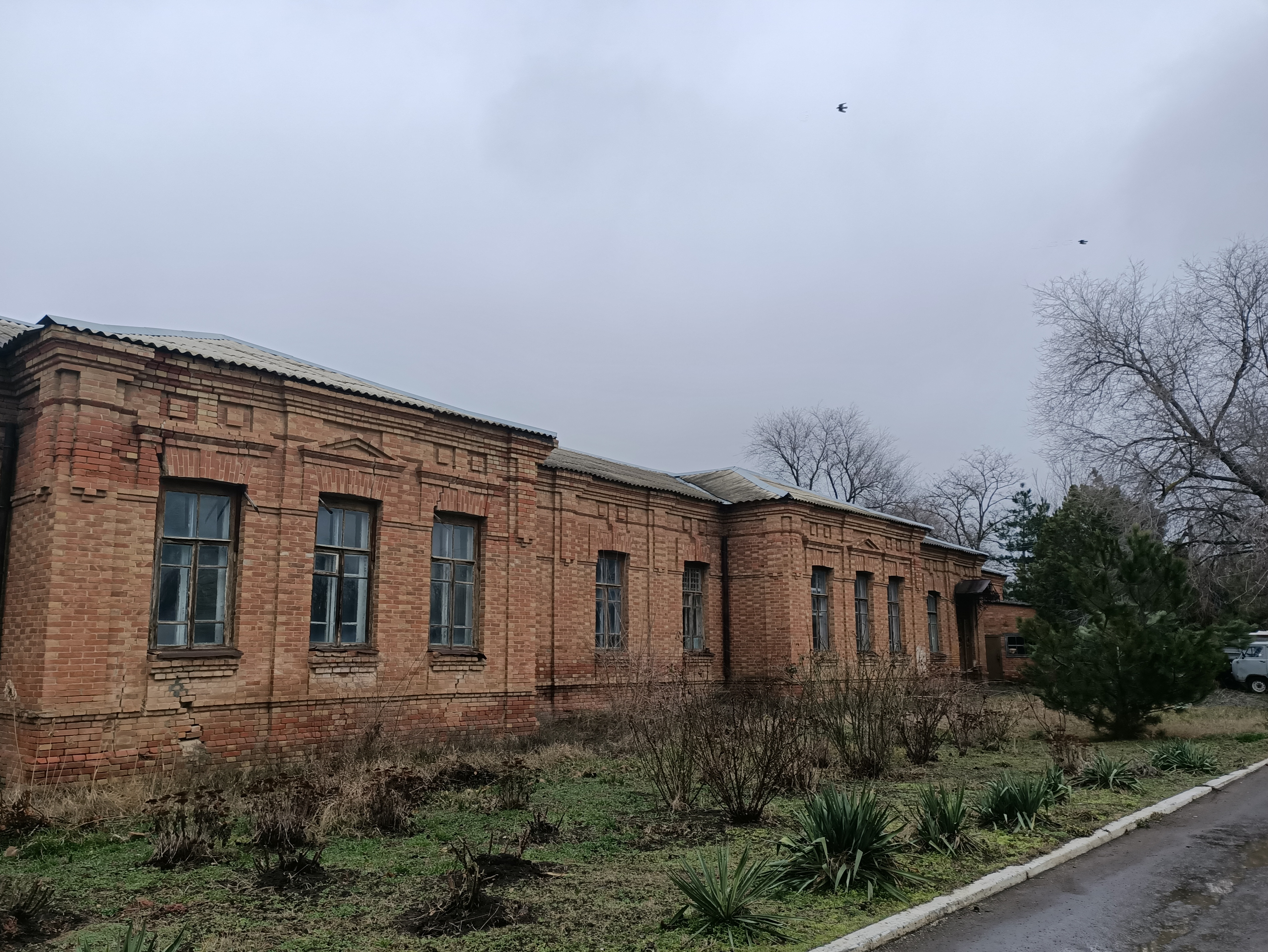 Фото исторического здания 1908 г., расположенного на территории Городовиковской районной больницы. Здесь в 1908 г. открылась первая улусная больница. Здание относится к первым постройкам времён князя Михаила Гахаева. Курировал строительство главный архитектор Ставропольской губернии Григорий Кусков